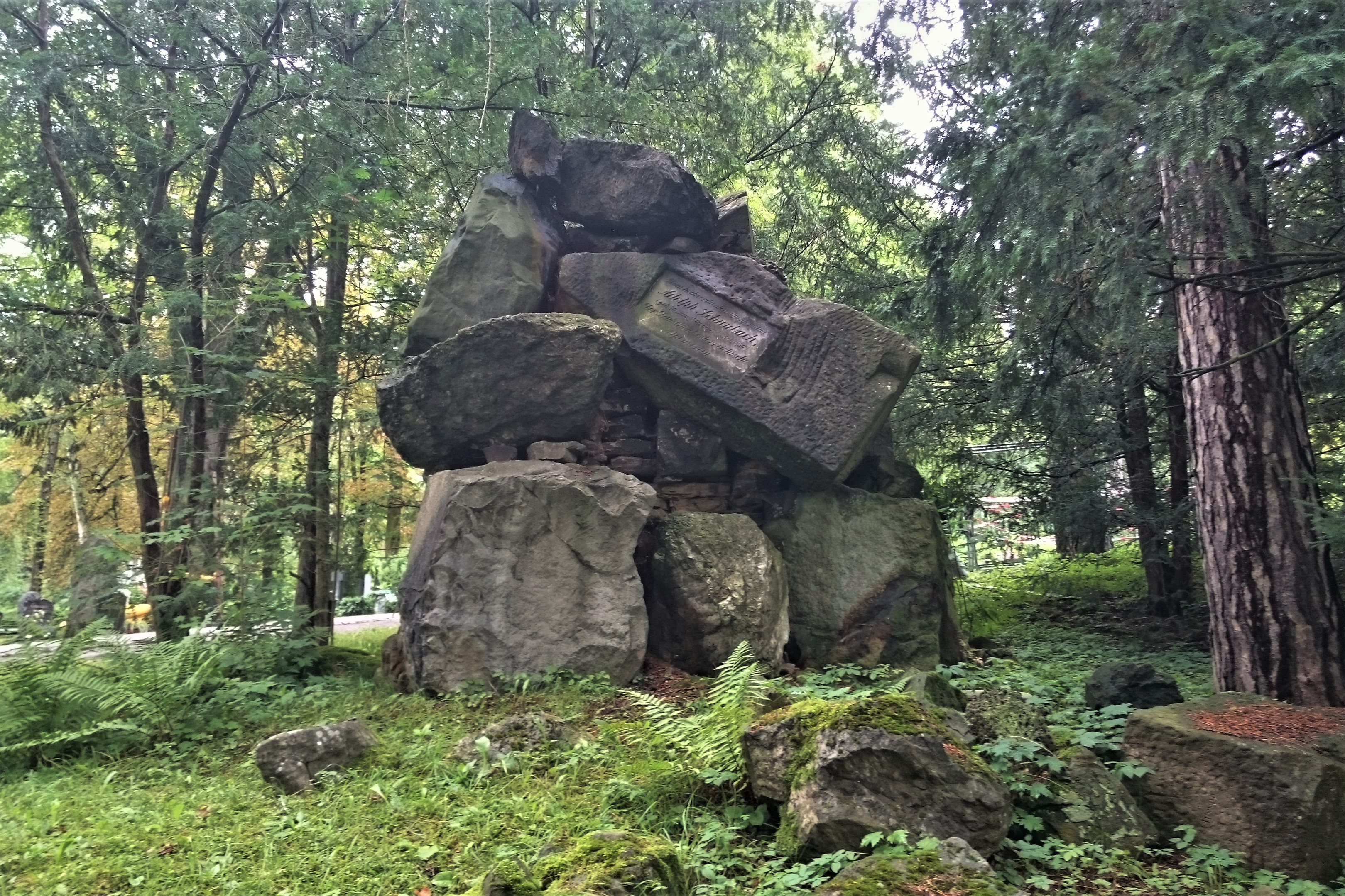 Denkmal für den Alpenforscher Adolf Schaubach im Parkfriehof von Meiningen. Inschrift: „Dem hochverdienten Alpenforscher Adolph Schaubach, (geb. 30. Jan. 1800. gest. 28. Nov. 1850.) Der Deutsche u. Oesterreichische Alpenverein.“